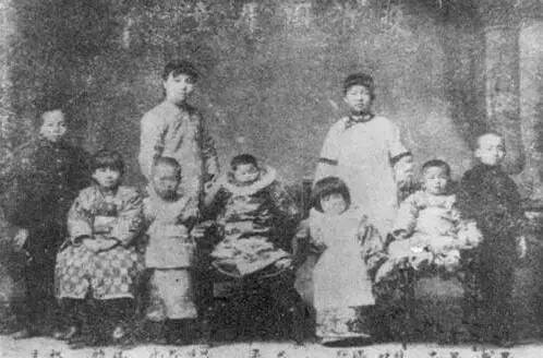 Жена и наложница Лян Цичао и девять их детей